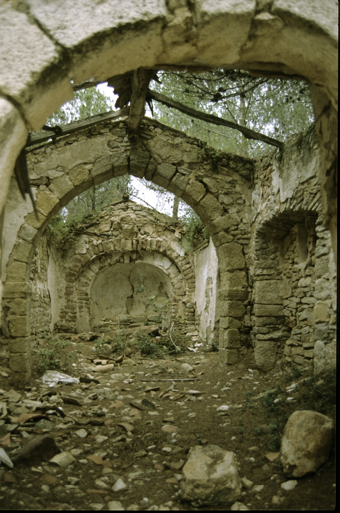 Selma. Caplle de Sant Miquel del Pla de Manlleu. Fot. J. Fuguet, 1996.